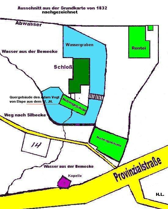 Haus Bamenohl Skizze um 1832